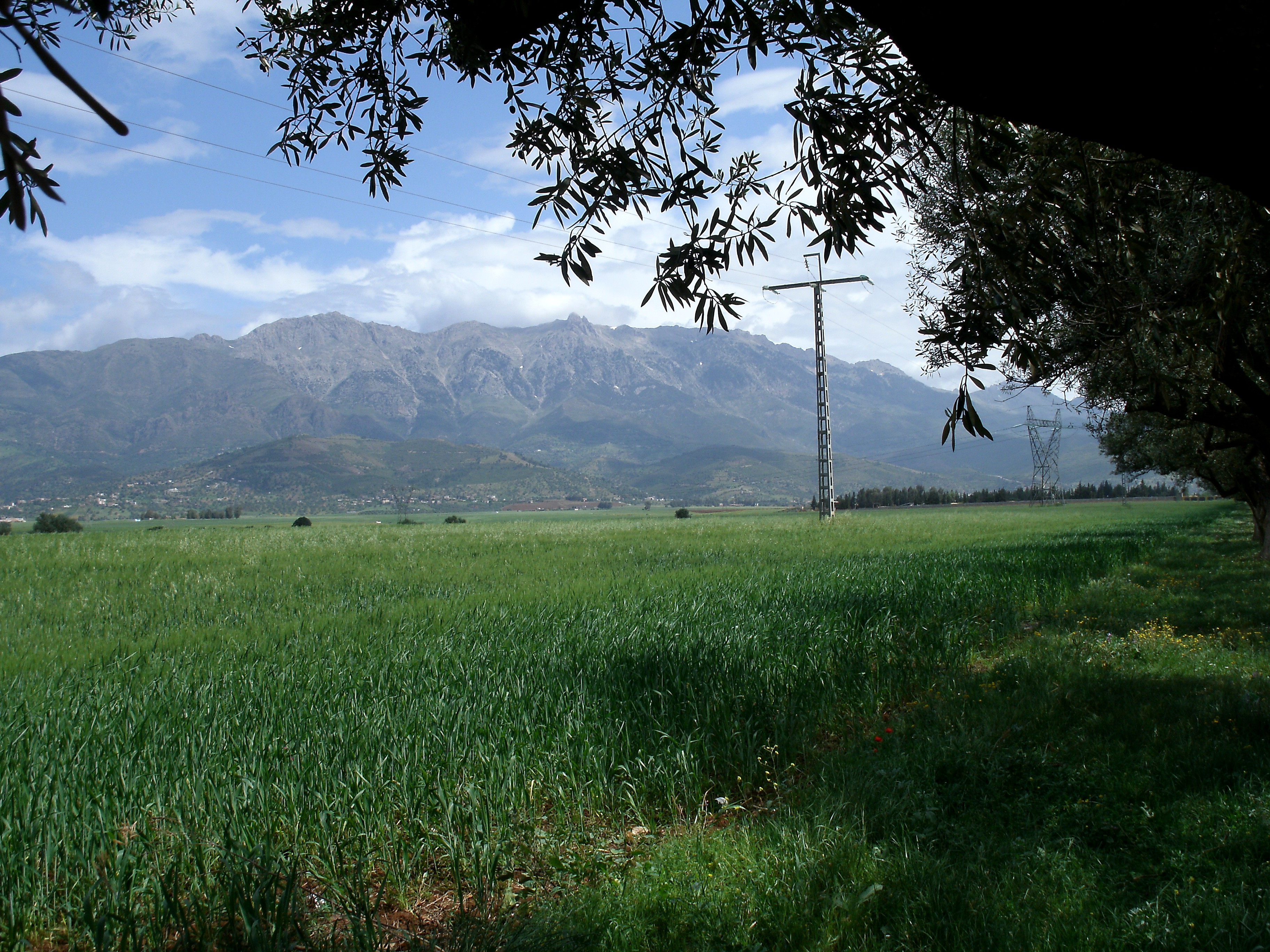 Versant Sud du Djebel Haïzer dans le Djurdjura